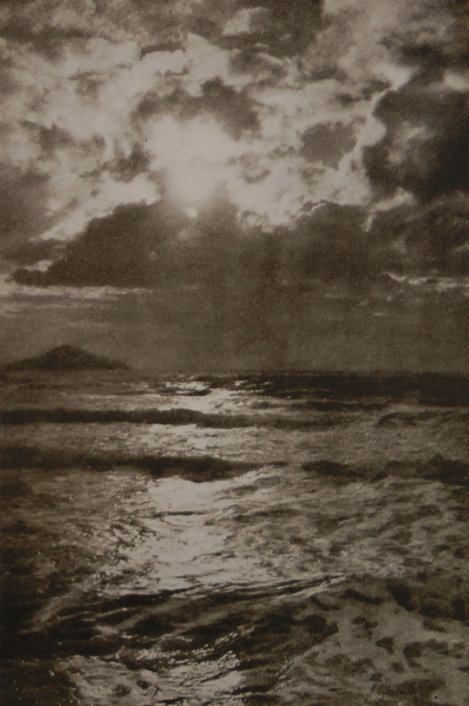 Юрий Ерёмин. Вечер в Байе. 1909